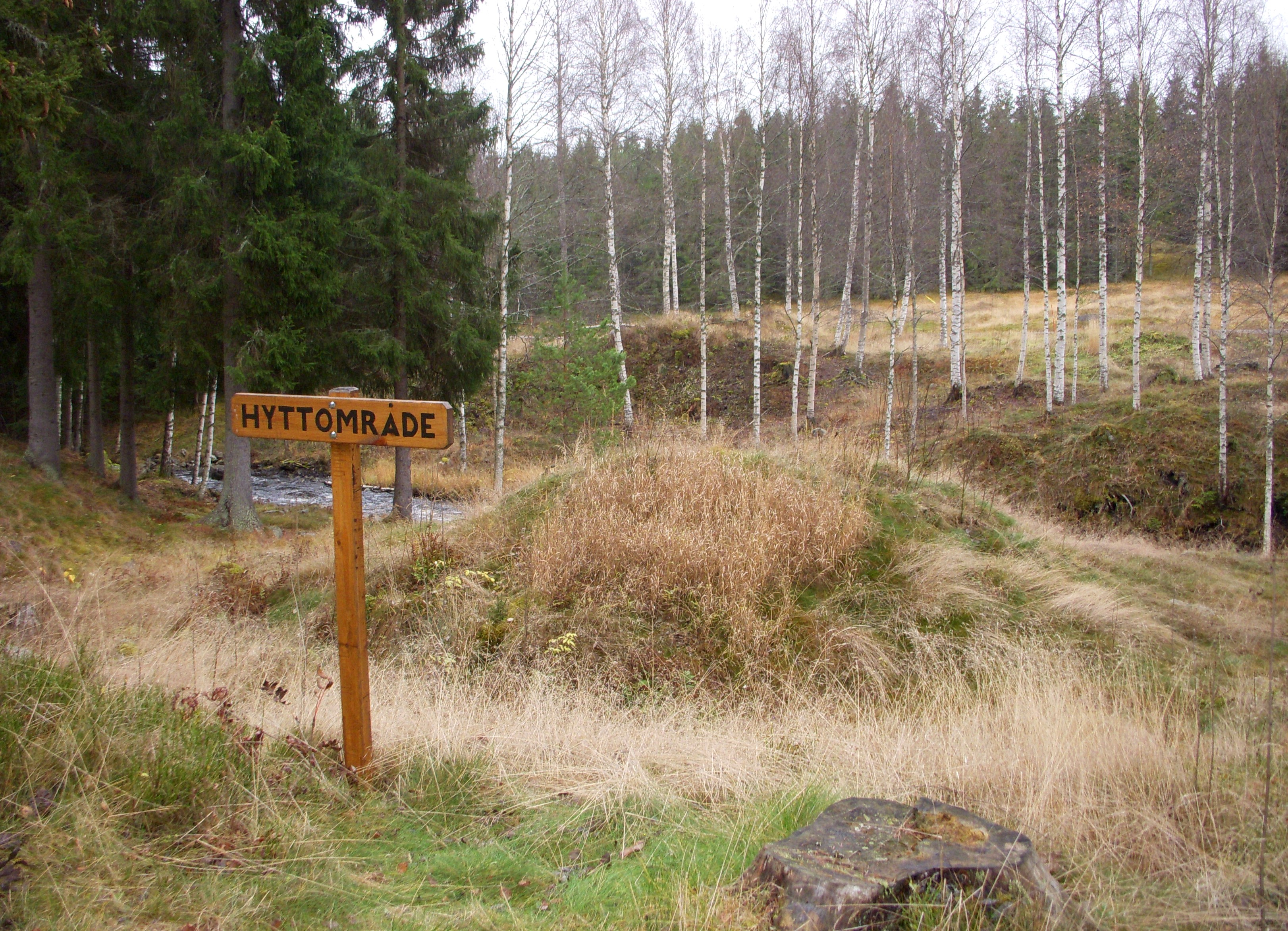 Rester efter Jönshyttan, Säters kommun